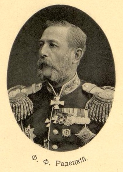 генерал от инфантерии Фёдор Фёдорович Радецкий